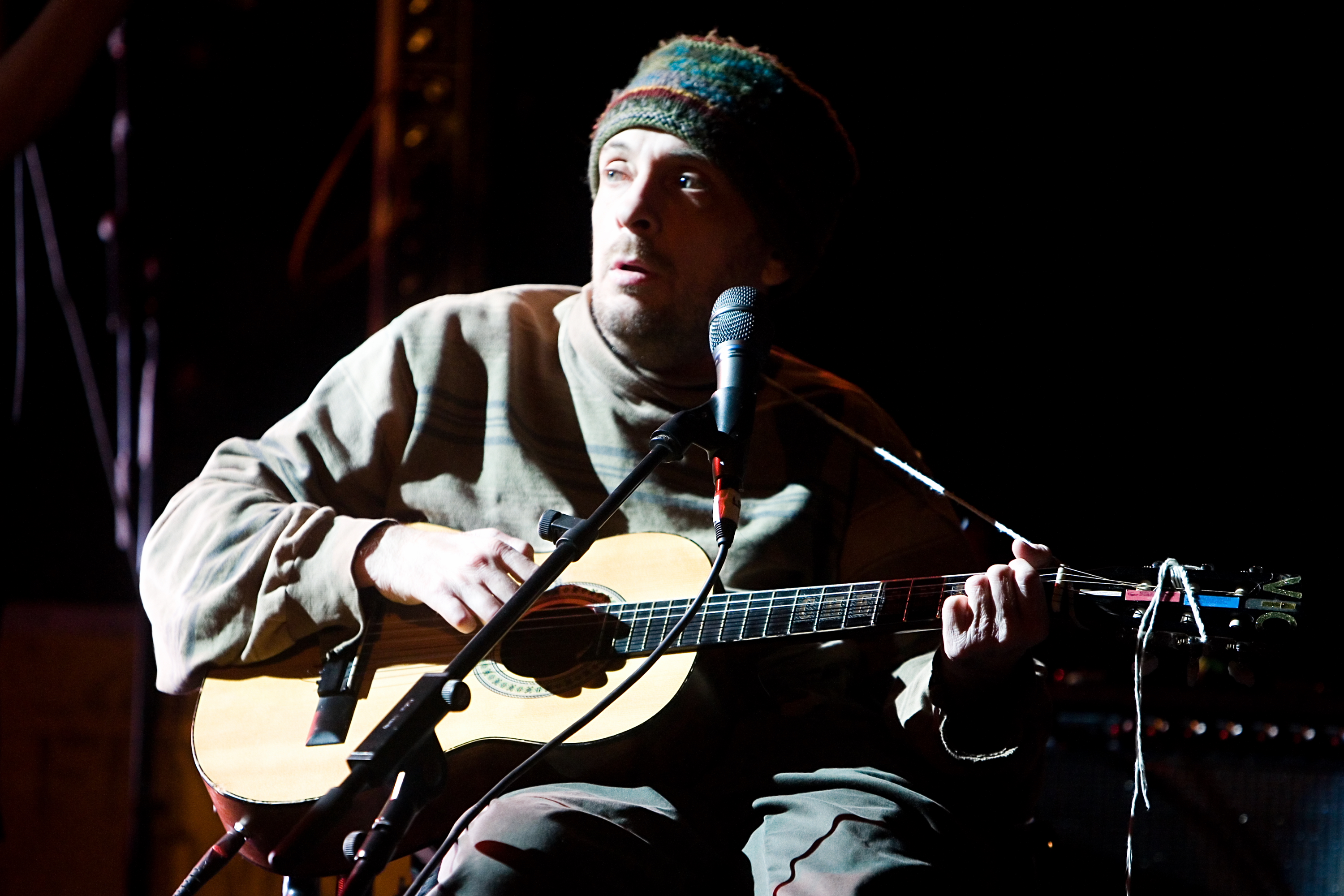 Vic Chesnutt at La Route du Rock 2008